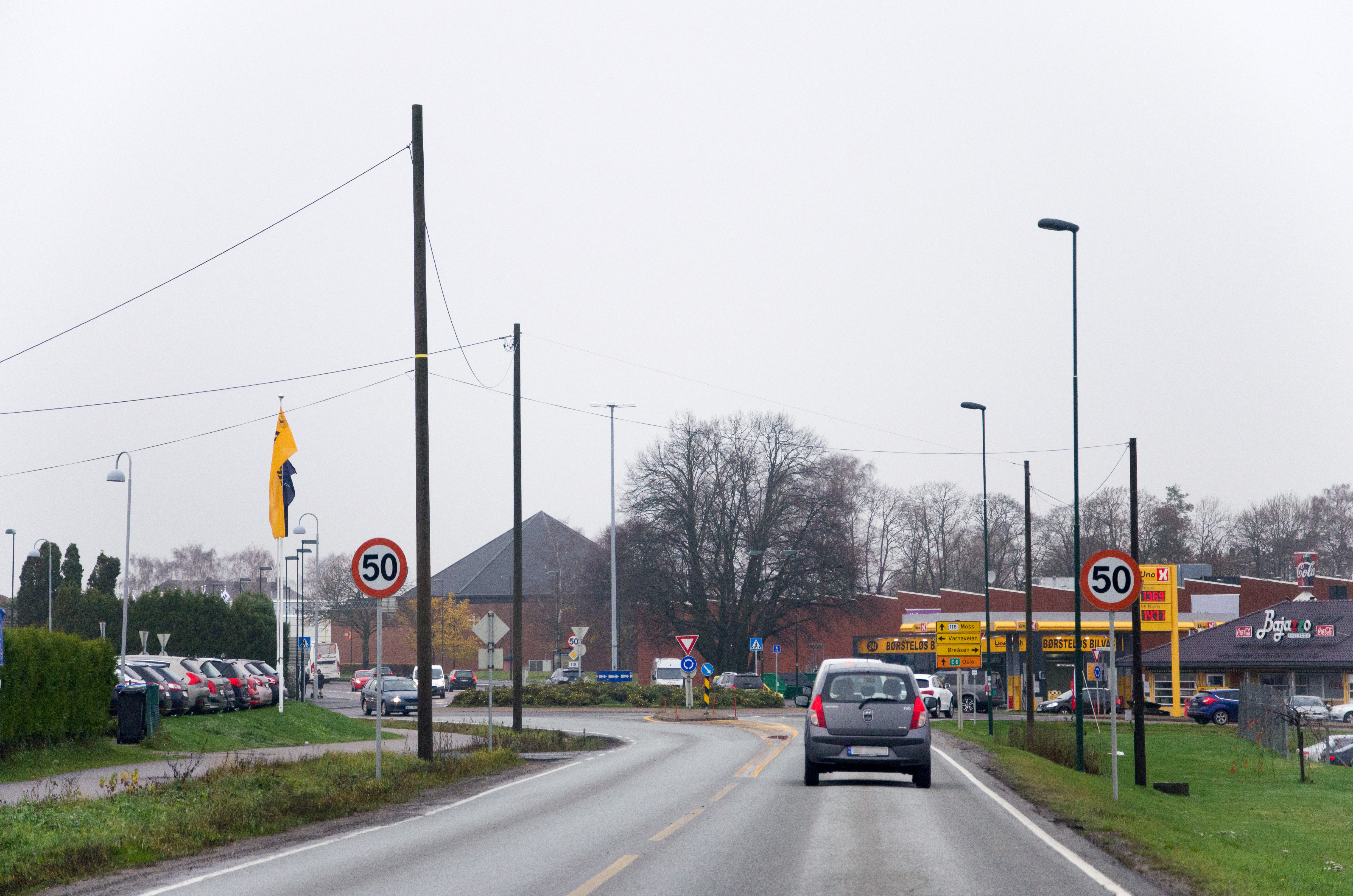 Østfolds fylkesvei 118 Ryggeveien